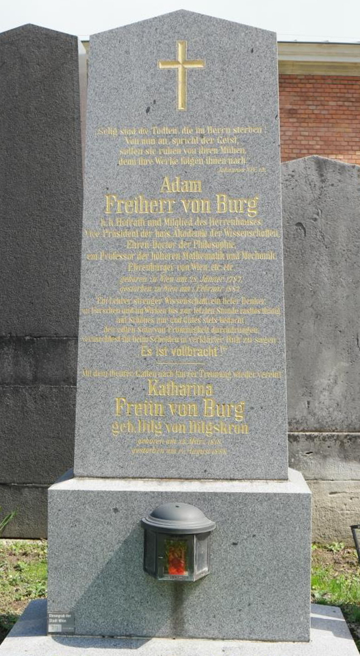 Grab des Mathematikers und Technologen Adam von Burg (1797-1882) auf dem Wiener Zentralfriedhof